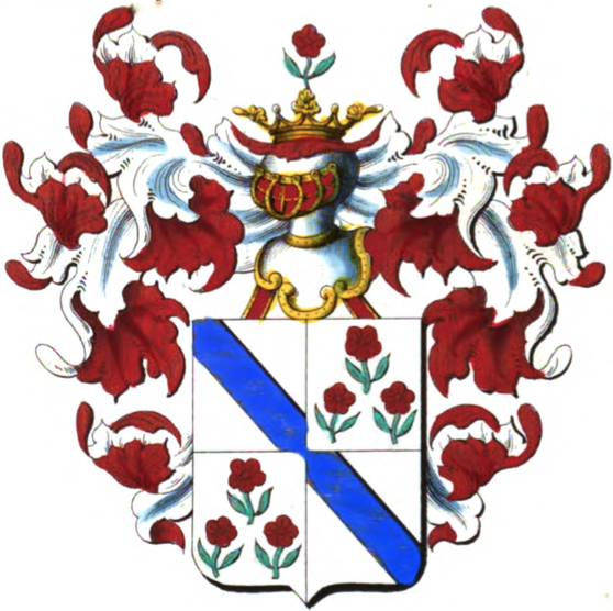 Armoiries de la famille Simonis